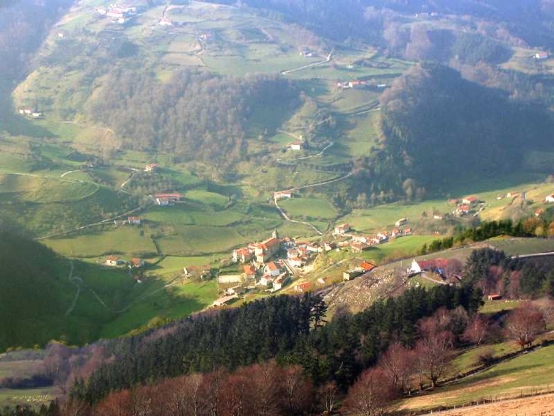 Vista general del municipio de Régil, Guipúzcoa, País Vasco, España. Errexil